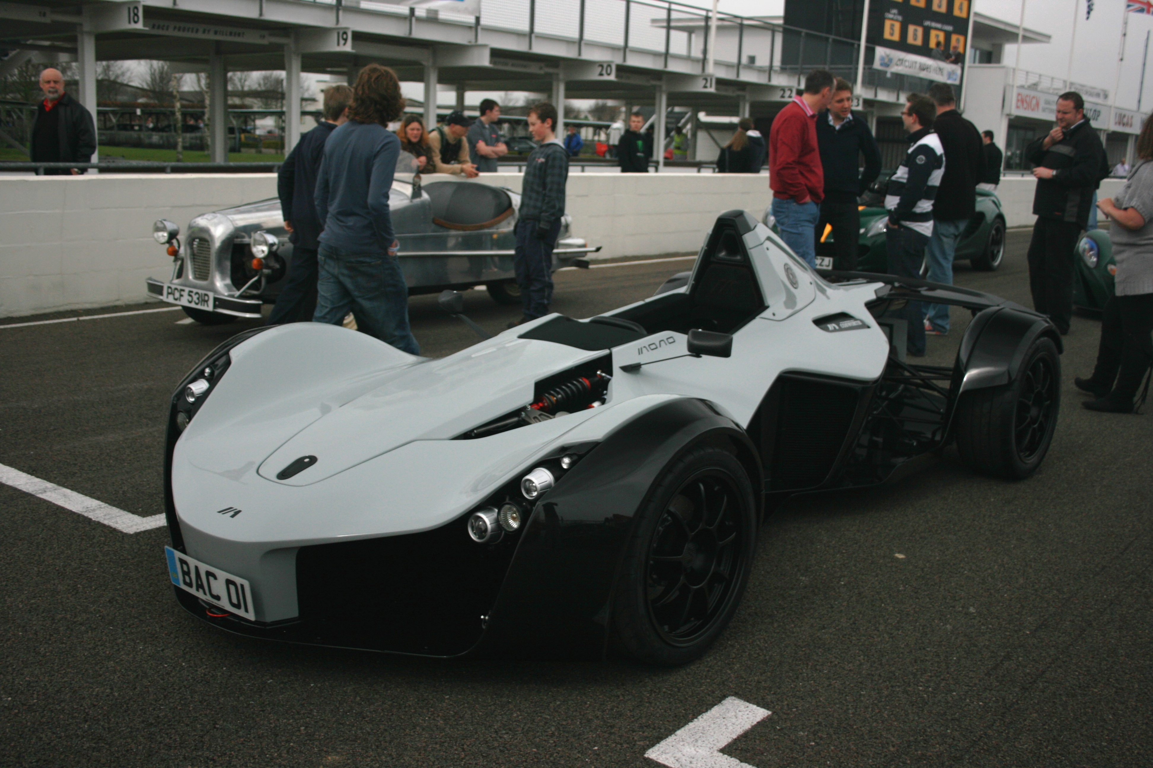 BAC Mono